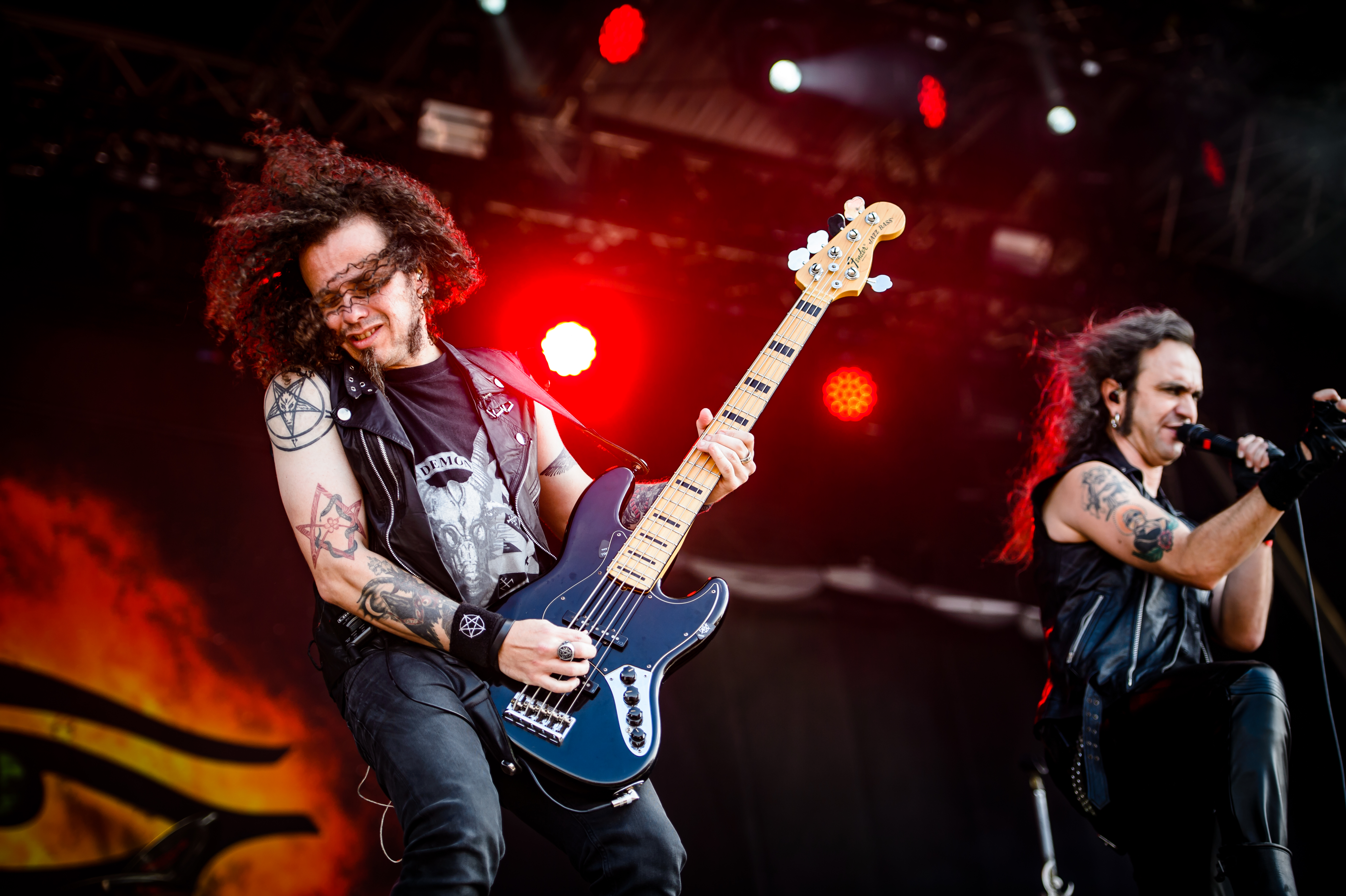 'RockHarz Open Air 2017; Ballenstedt': 'Moonspell'